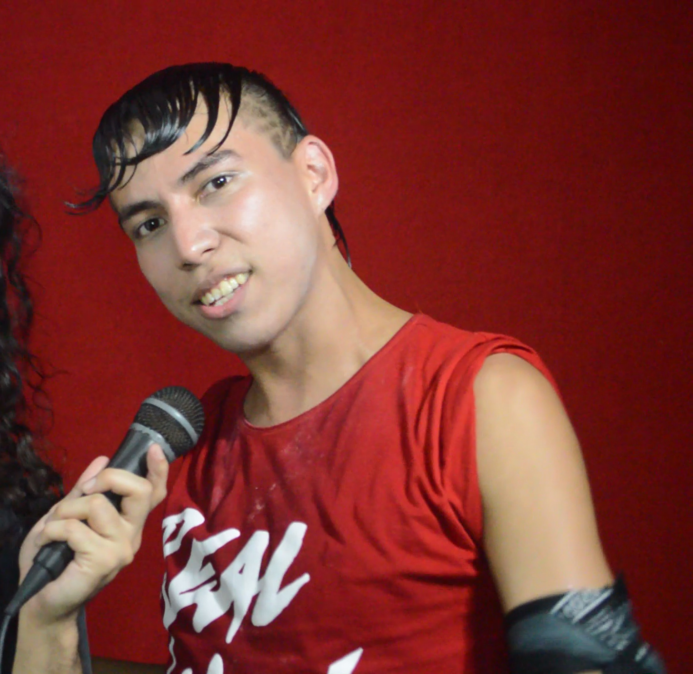 EL BRAYAN DE CUATRO CUARTOS, ES UN PERSONAJE INTERPRETADO POR EL ACTOR ALEX VIZUETE, DURANTE SU CIRCO EN DURÁN EL 16 DE JULIO DE 2017.